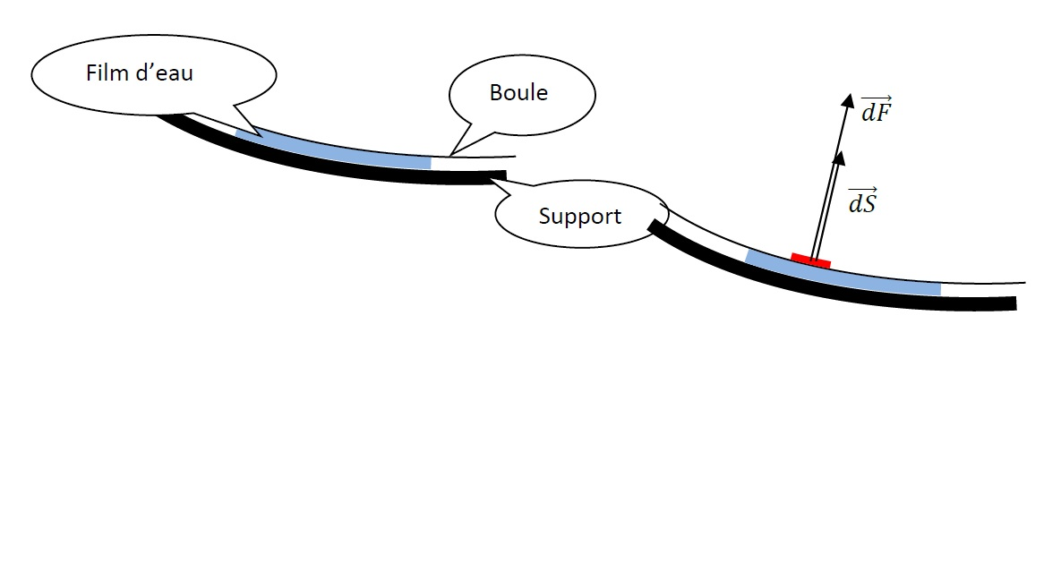 Pression d'equilibre statique